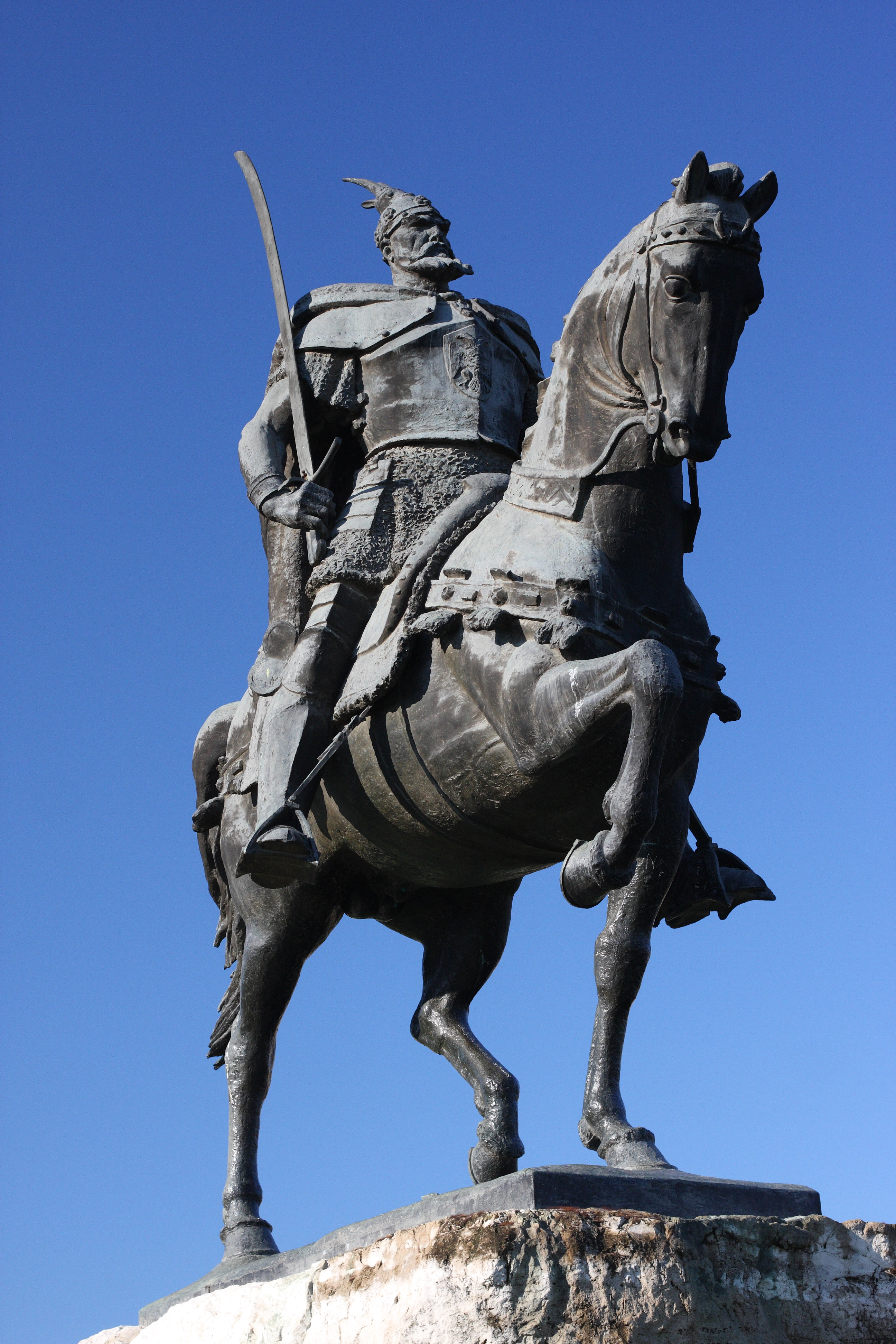 Tirana, Albania